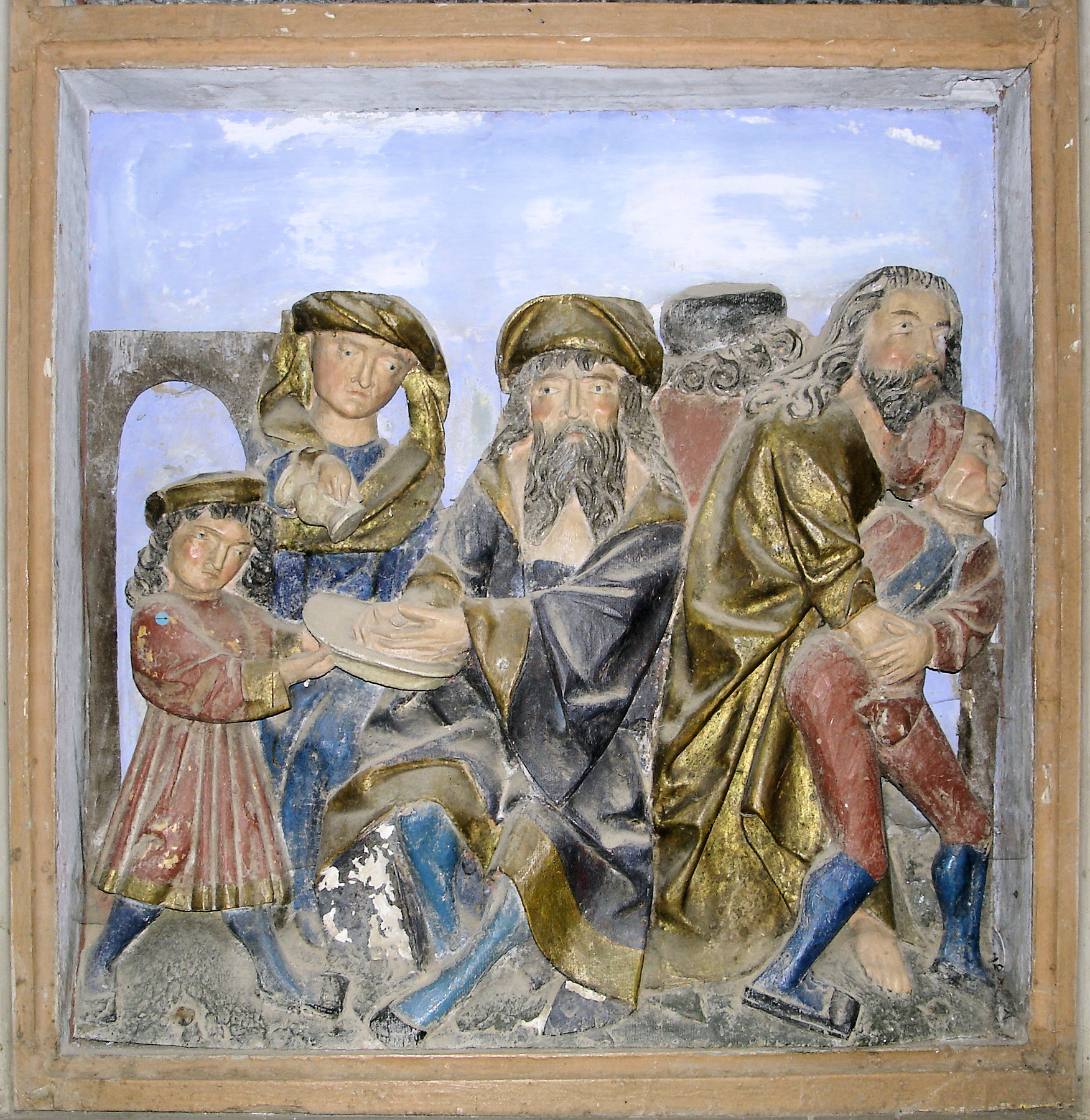 Kirche in Vilz bei Tessin (Mecklenburg) / Church in Vilz near Tessin (Mecklenburg-Western Pomerania)